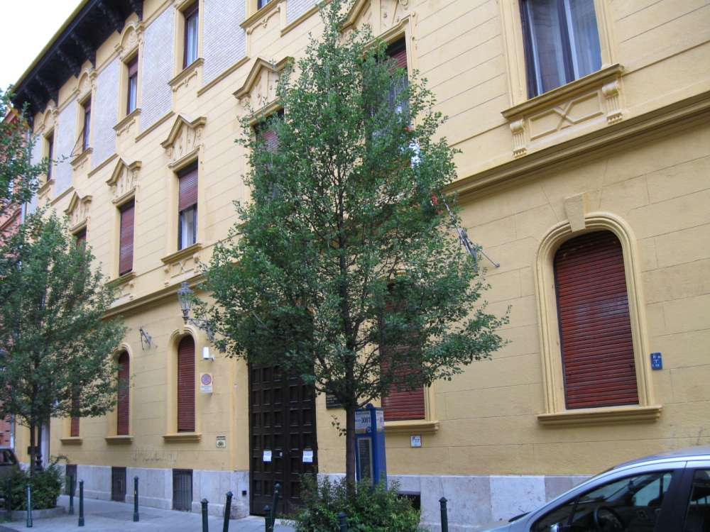 Károli Gáspár Református Egyetem, Bölcsészettudományi kar (Budapest, VIII. ker., Reviczky u. 4.)